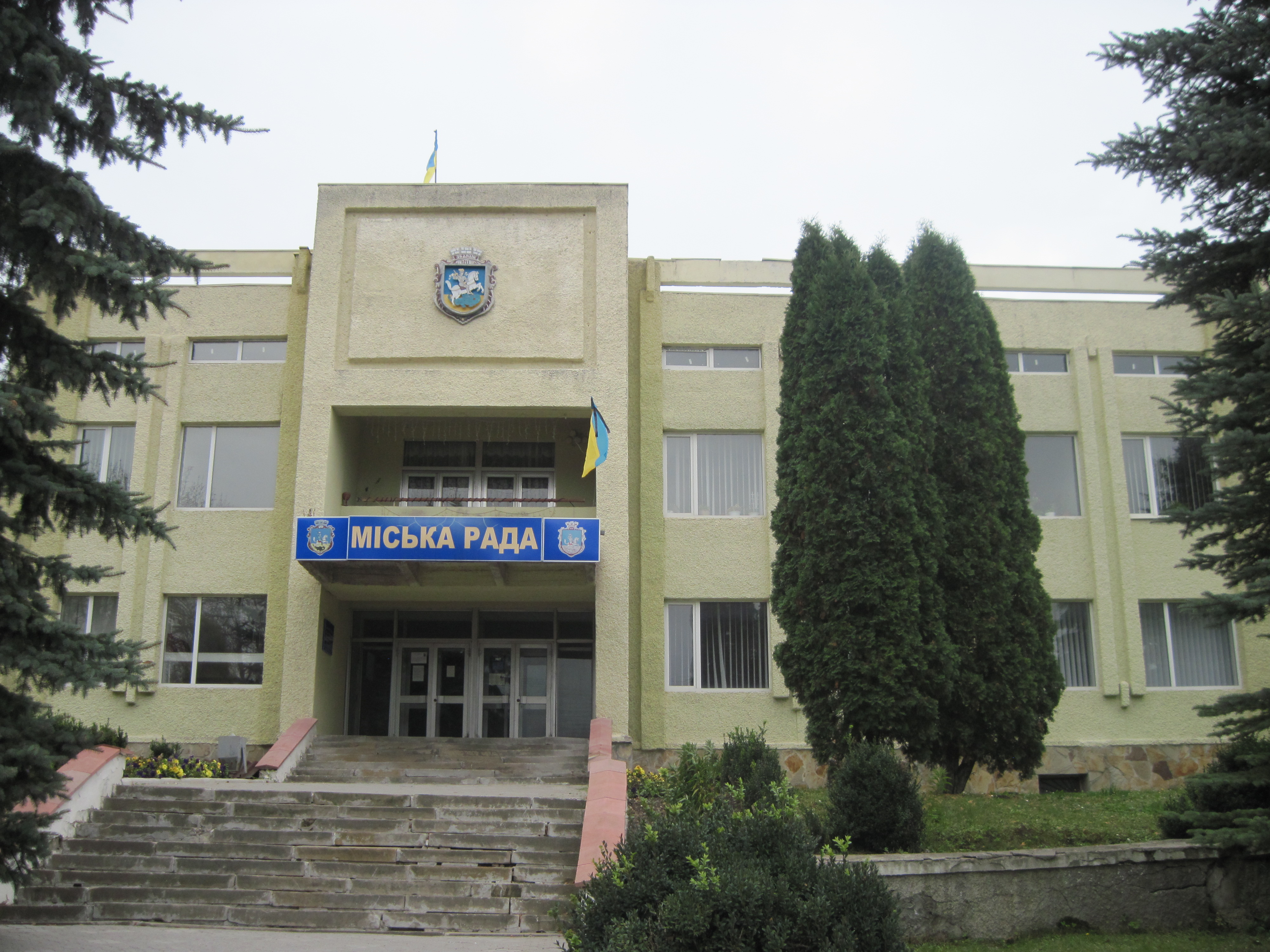 Збаразька міська рада